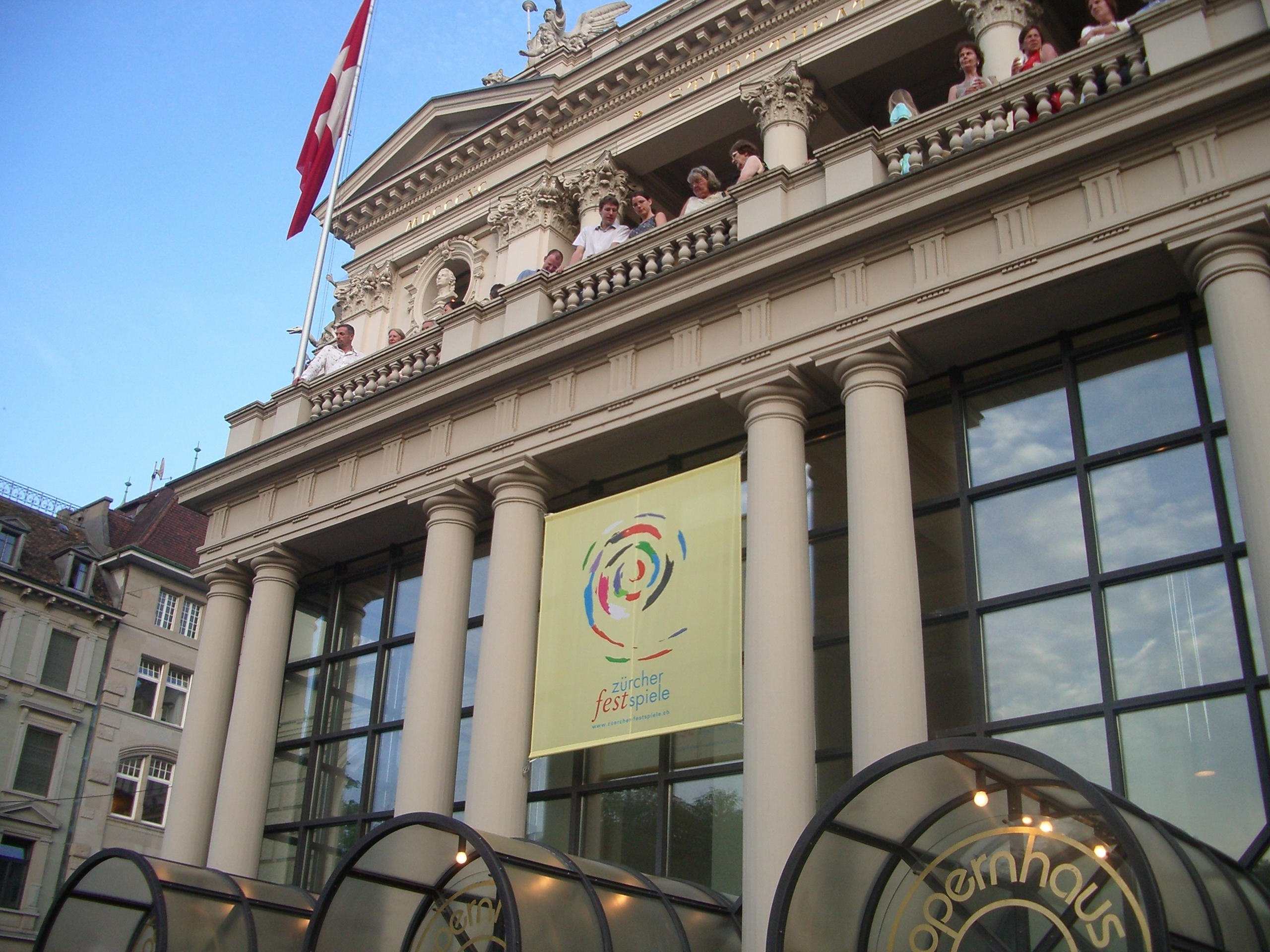 Opernhaus Zürich (Balkon über dem Eingang)